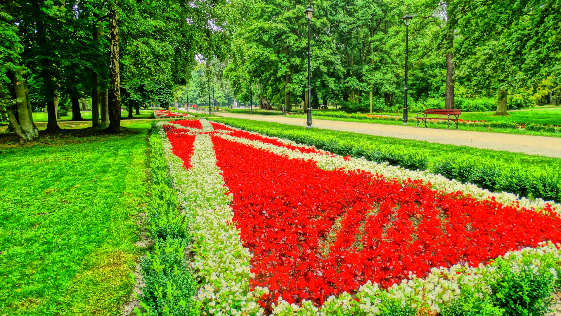 Świnoujście, park zdrojowy, 1827, 1939, po 1945